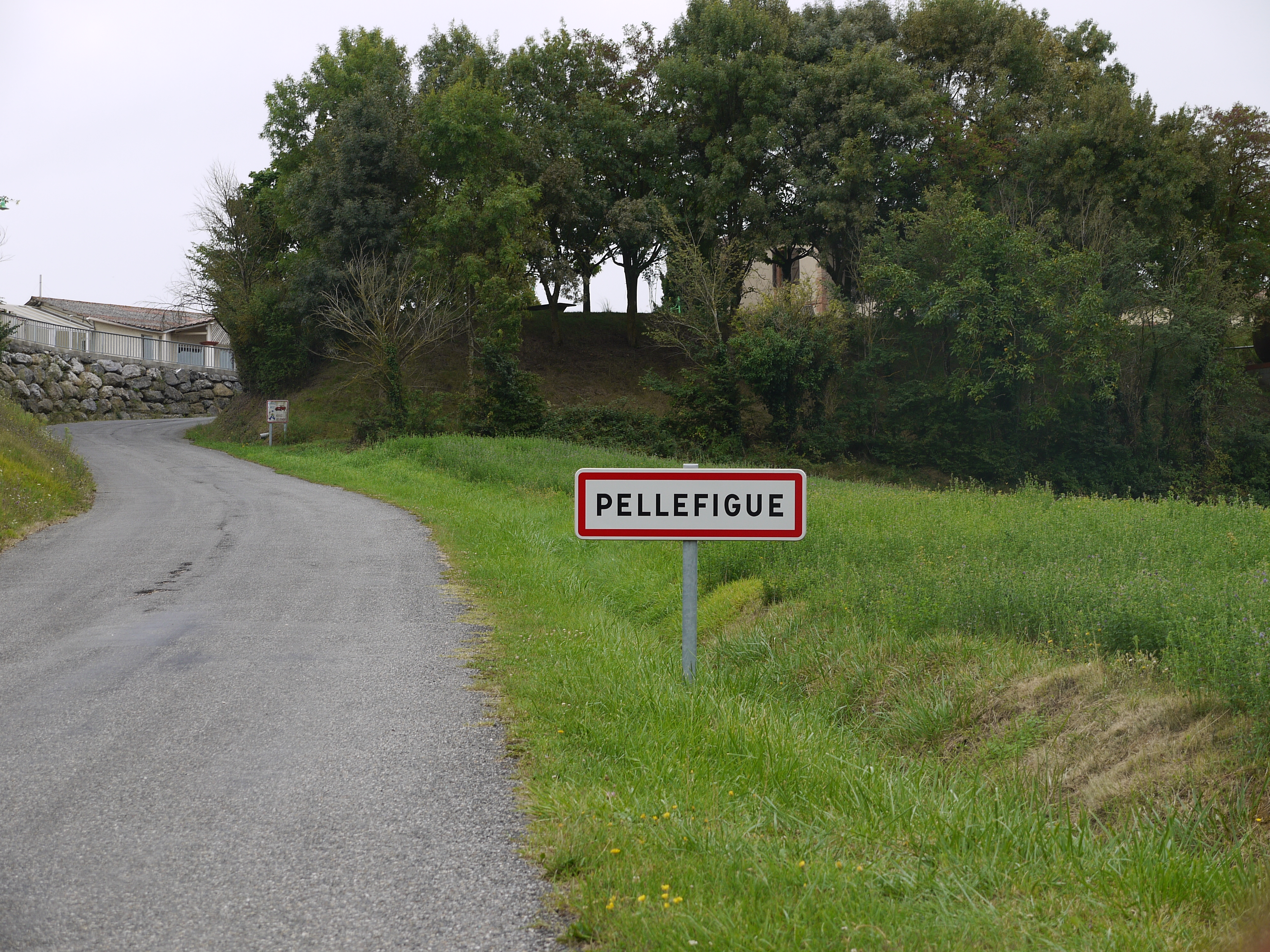 L'entrée nord de Pellefigue.